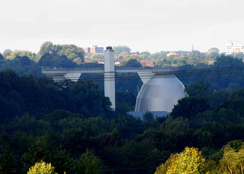 Bochum, Ölbach, Klärwerk von Witten-Heven aus gesehen